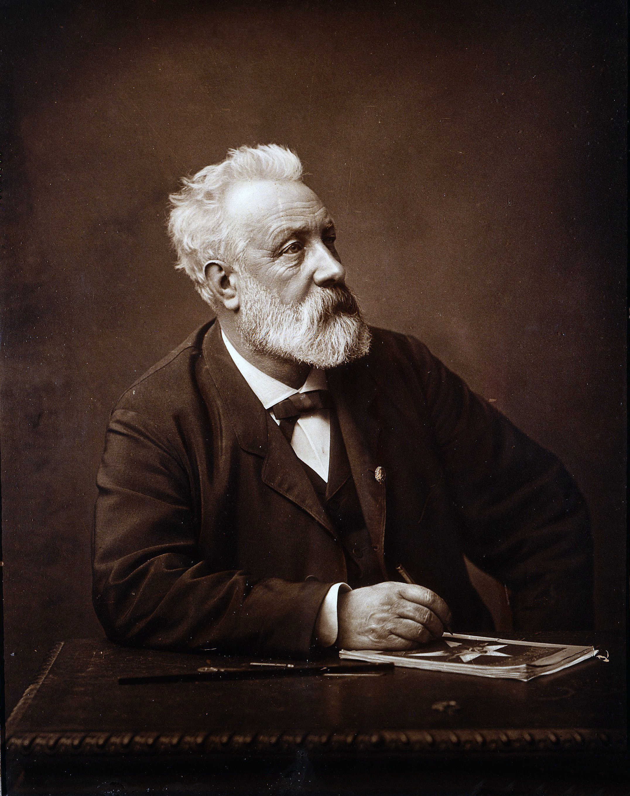 Jules Verne in 1892 (age 64)